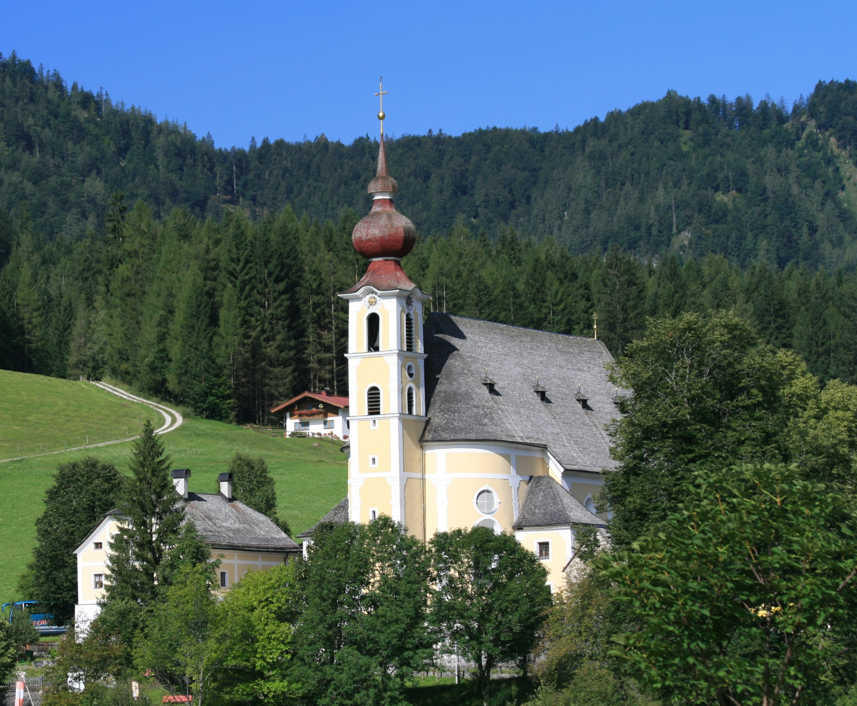 röm.-kath. Pfarrkirche, Waidring